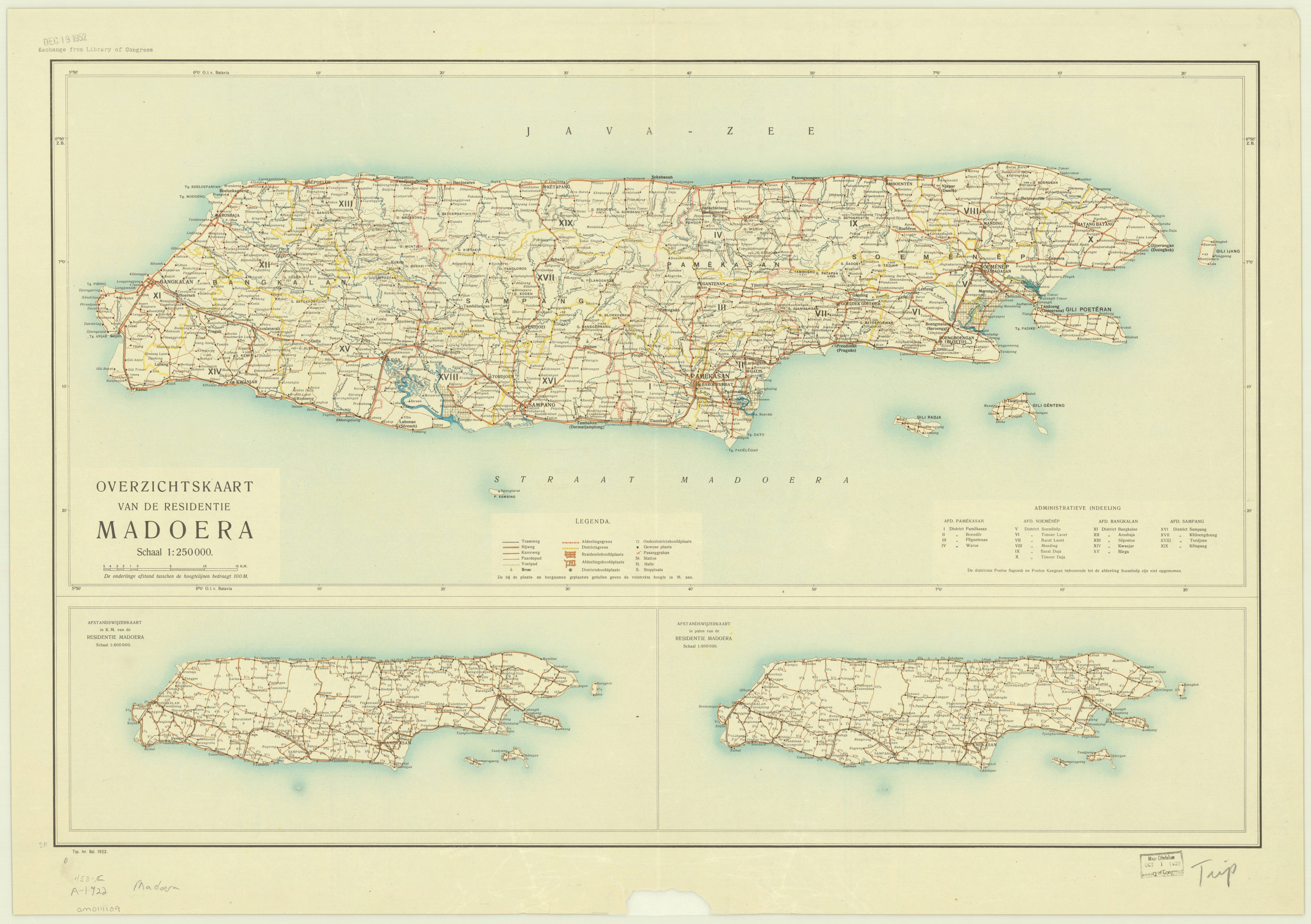 Peta Pulau Madura pada tahun 1922.